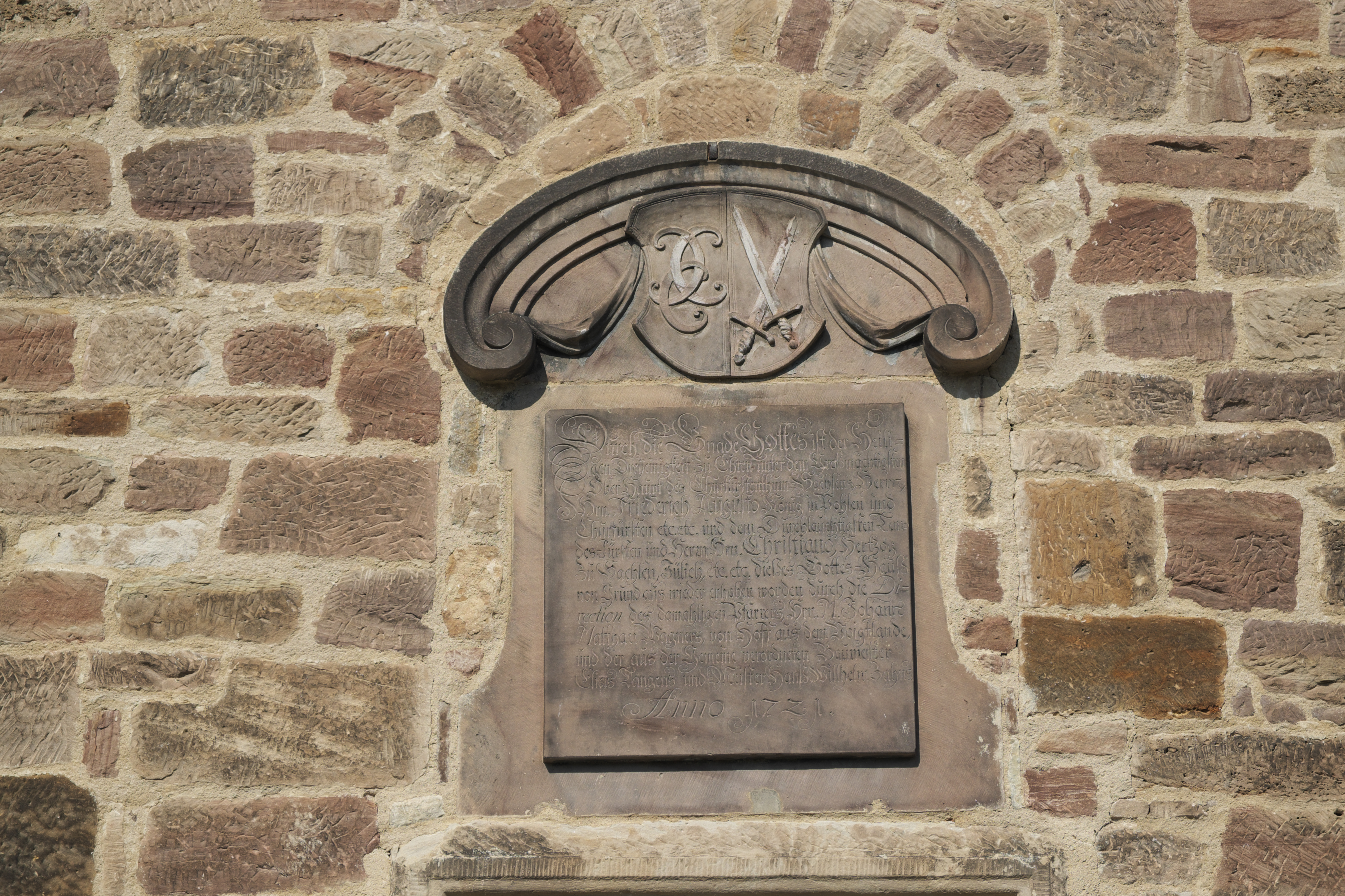 Kirche St. Michaelis in Grockstädt, einem Stadtteil von Querfurt im Saalekreis in Sachsen-Anhalt/Deutschland, Inschriftstein mit Wappen